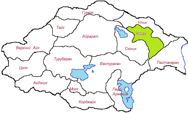 На карте Великой Армении, выделен (зелёным цветом) штат Арцах